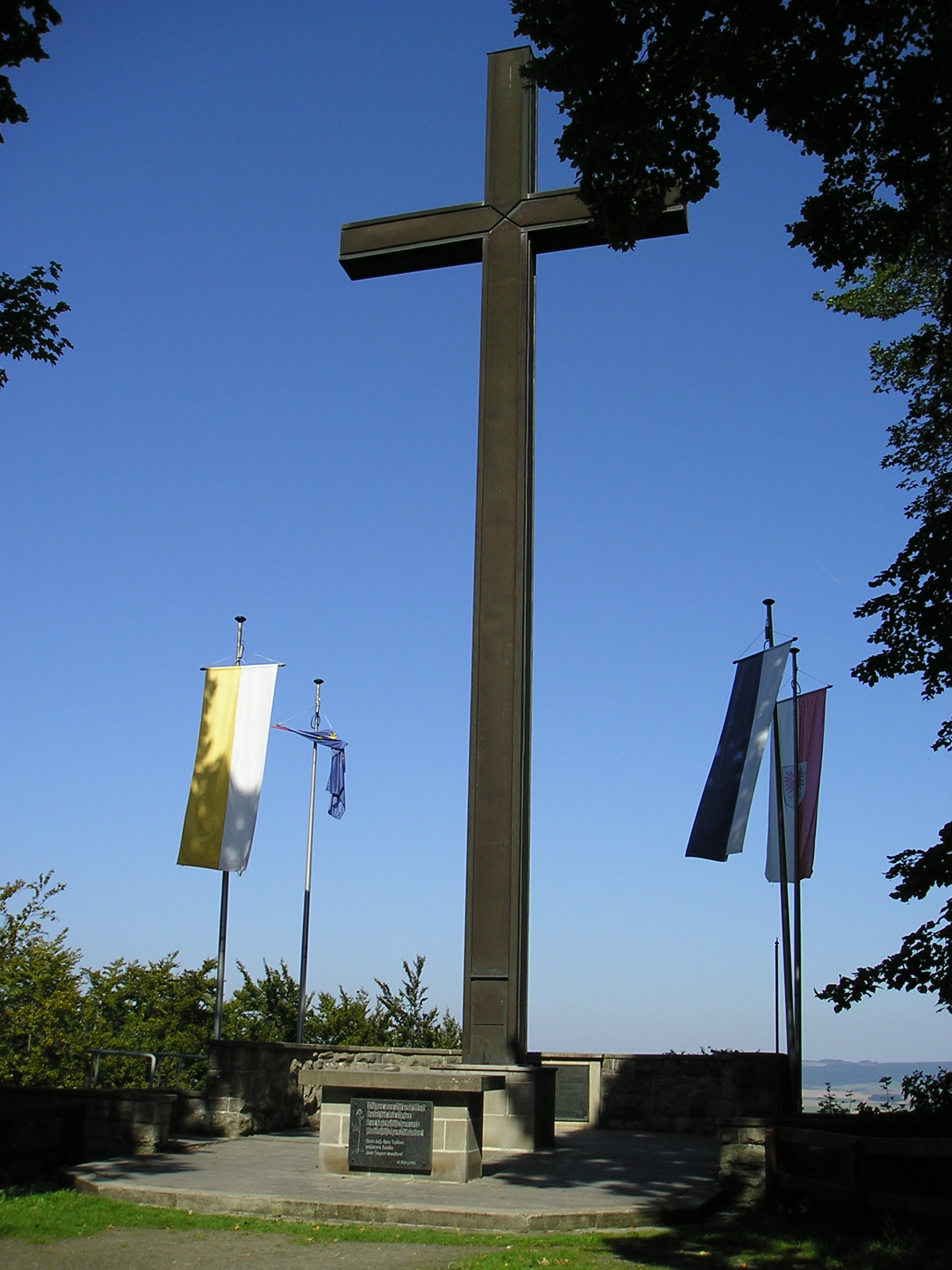 Dr.-Konrad-Martin-Kreuz auf dem Hülfensberg, Geismar, Landkreis Eichsfeld, Thüringen, Deutschland.